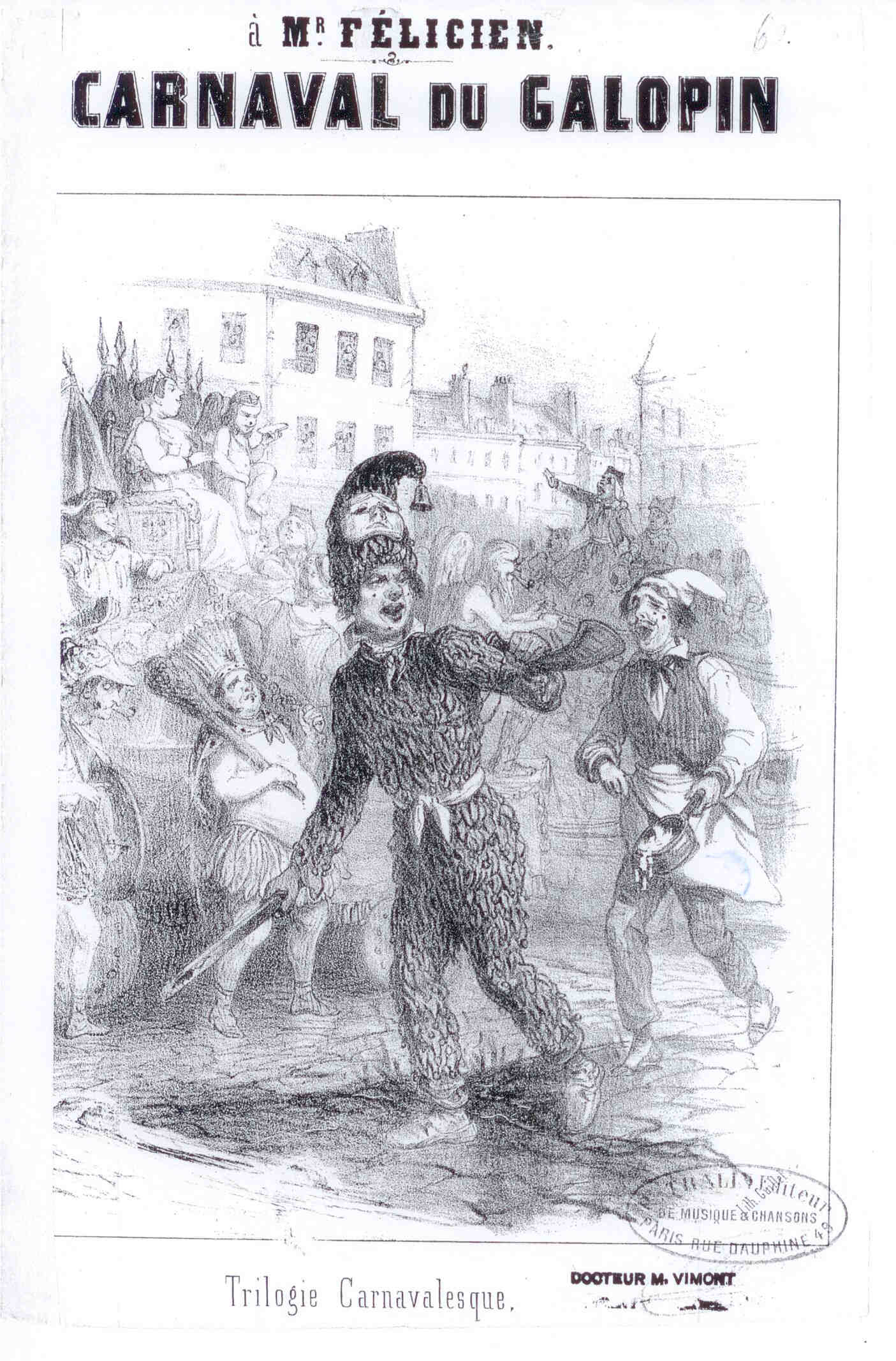 Scène de Carnaval à Paris, en fond le cortège du Bœuf Gras. Le texte parle de Philippe Musard en activités, comme il a pris sa retraite en 1854, le document peut être daté d'avant cette date.